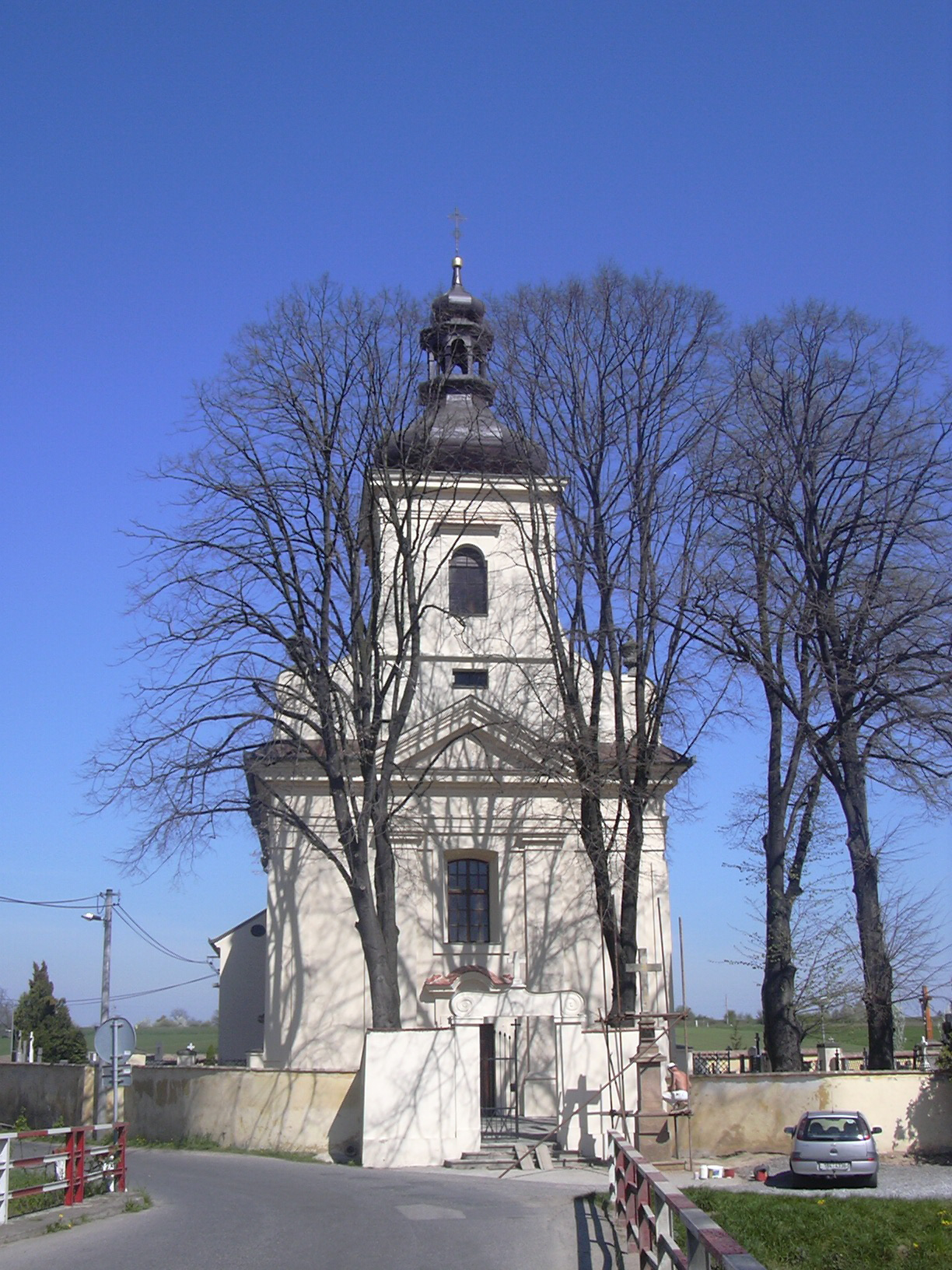 Topolany - Kostel svatého Mikuláše / St. Nicholas Church (Vyškov District, Czech Republic)